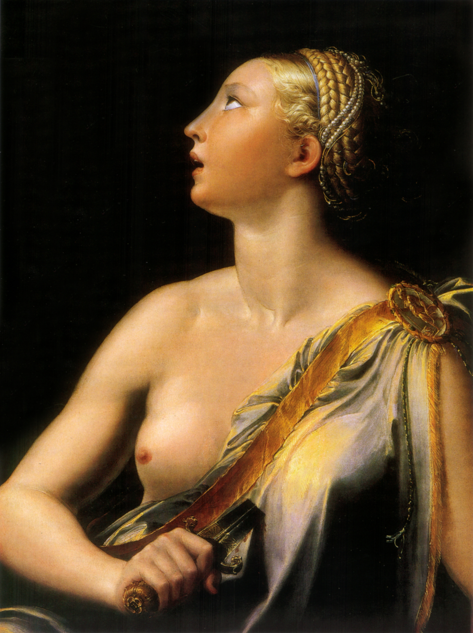 Lucrezia